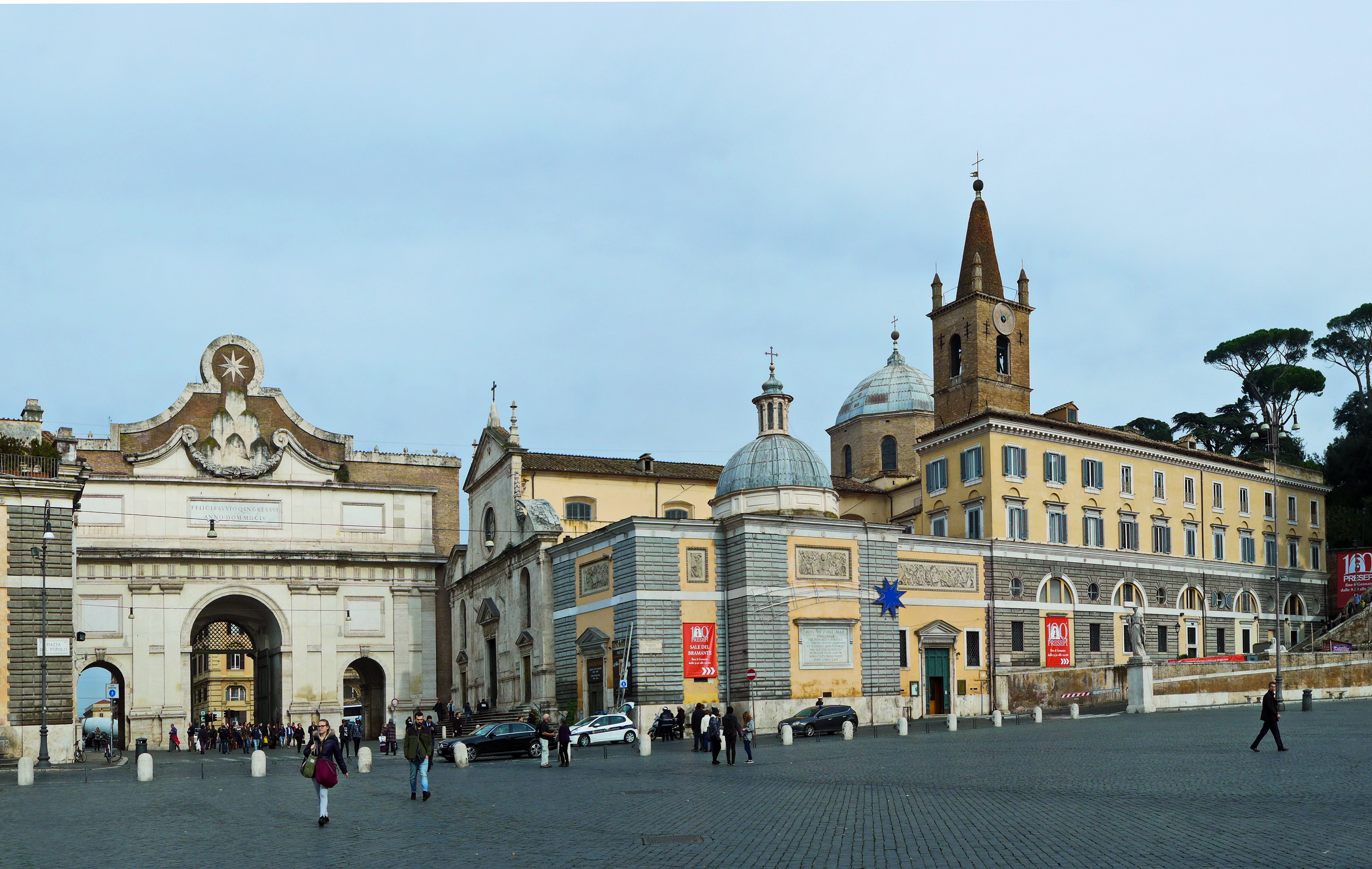 Piazza Del Popolo mit Kirche und Kloster Santa Maria Del Popolo